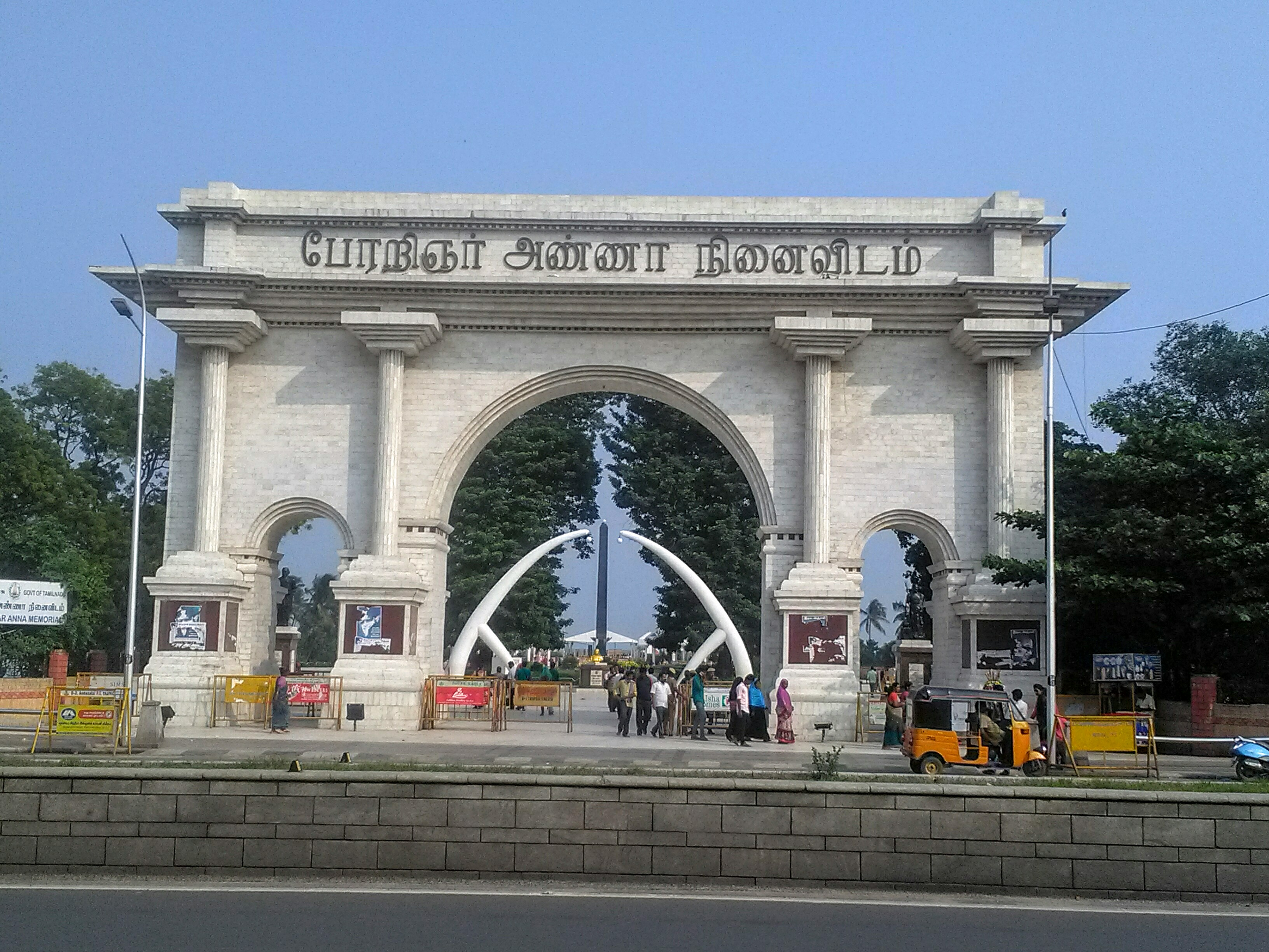 அண்ணா சதுக்கம் ..